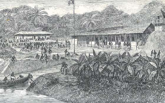 Image ancienne. Origine